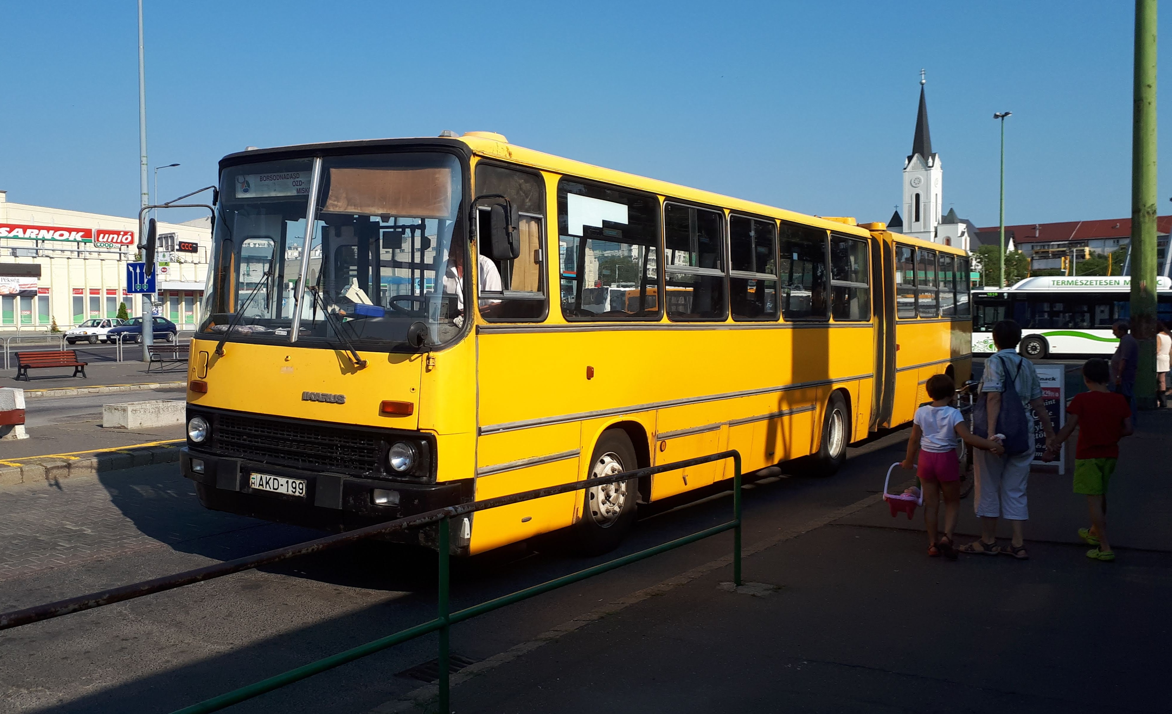 Az ÉMKK AKD-199 rendszámú Ikarus 280 típusú busza Miskolcon, a 3770-es helyközi járaton.